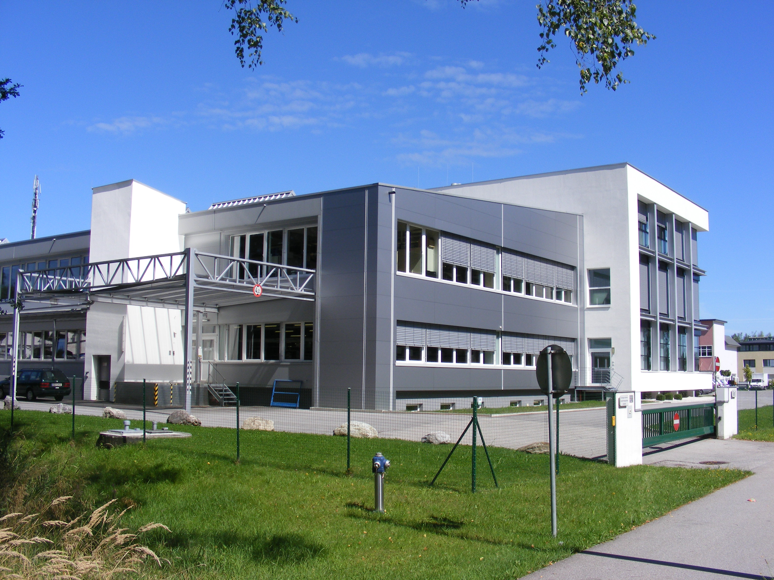 Das Werk II des W&H Dentalwerks in Bürmoos, Bezirk Salzburg-Umgebung